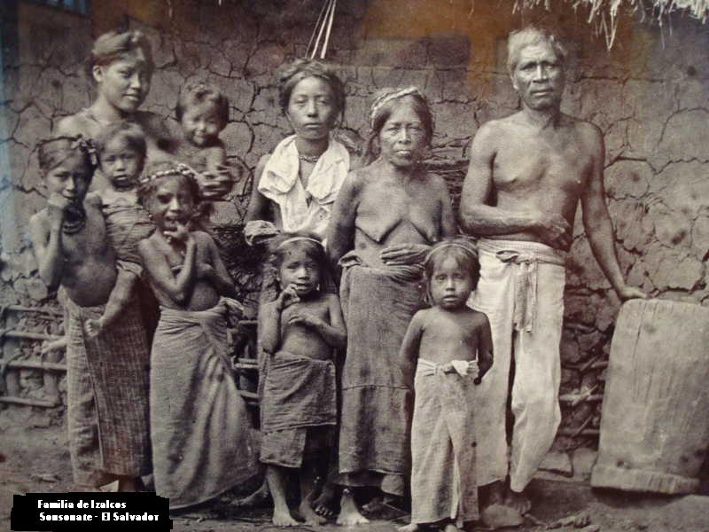 Familia de indigenas Izalcos, en el departamento de Sonsonate en El Salvador